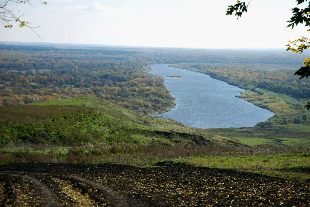 Сафаҗай вид на речку Сура